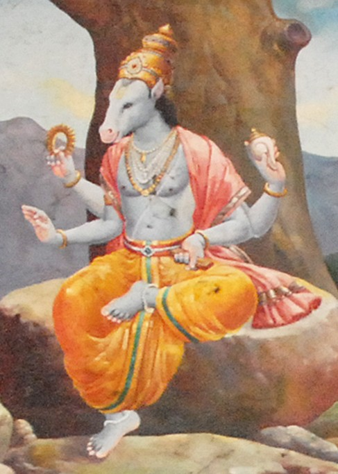 Peintures du plafond du temple de Shivakamasundari, dans l'enceinte du temple de Shiva Nataraja à Chidambaram Le temple de la déesse Shivakamasundari (une des formes de Parvati), parèdre de Shiva, est situé sur le côté ouest du réservoir Shivaganga. La déesse y est vénérée comme le Jnana Shakti : l'énergie de la connaissance. Sur les plafonds de la salle hypostyle, des peintures du XVIIè siècle (?) illustrent l'histoire de Shivakamasundari. Les galeries qui entourent le temple et les piliers sont décorés de reliefs de danseurs et de musiciens. Le temple de Shiva Nataraja dans sa forme actuelle date principalement des 12e et 13e siècles, avec des ajouts ultérieurs dans le style dravidien. C'est l'un des lieux saints du Shivaïsme. Il est dédié au Shiva Nataraja (Shiva dansant). Les danses de Shiva sont au nombre de sept (avec 108 poses combinées). Celle dansée par Shiva à Chidambaram est la plus connue, c'est "l'ânada-tândavam". Elle est exécutée sur le terrain d'incinération, celui-ci symbolise le coeur des hommes, le feu détruisant notre ego, c'est à dire les illusions. La danse permet d'atteindre la libération. Le temple comprend 4 enceintes et 9 entrées (autant que le corps humain). Certaines entrées sont surmontées de Gopuram(s) de 7 étages. A l'intérieur du temple, se trouvent la Cella contenant la statue de Shiva Nataraja, plusieurs sanctuaires (Shivakamasundari, Subramanya/Murugan...) , un vaste bassin sacré, entouré d'une colonnade et des salles pour accueillir les fidèles dont une salle aux mille piliers (Raja Sabha). Site du temple du Shiva Nataraja Article de Wikipedia sur le temple